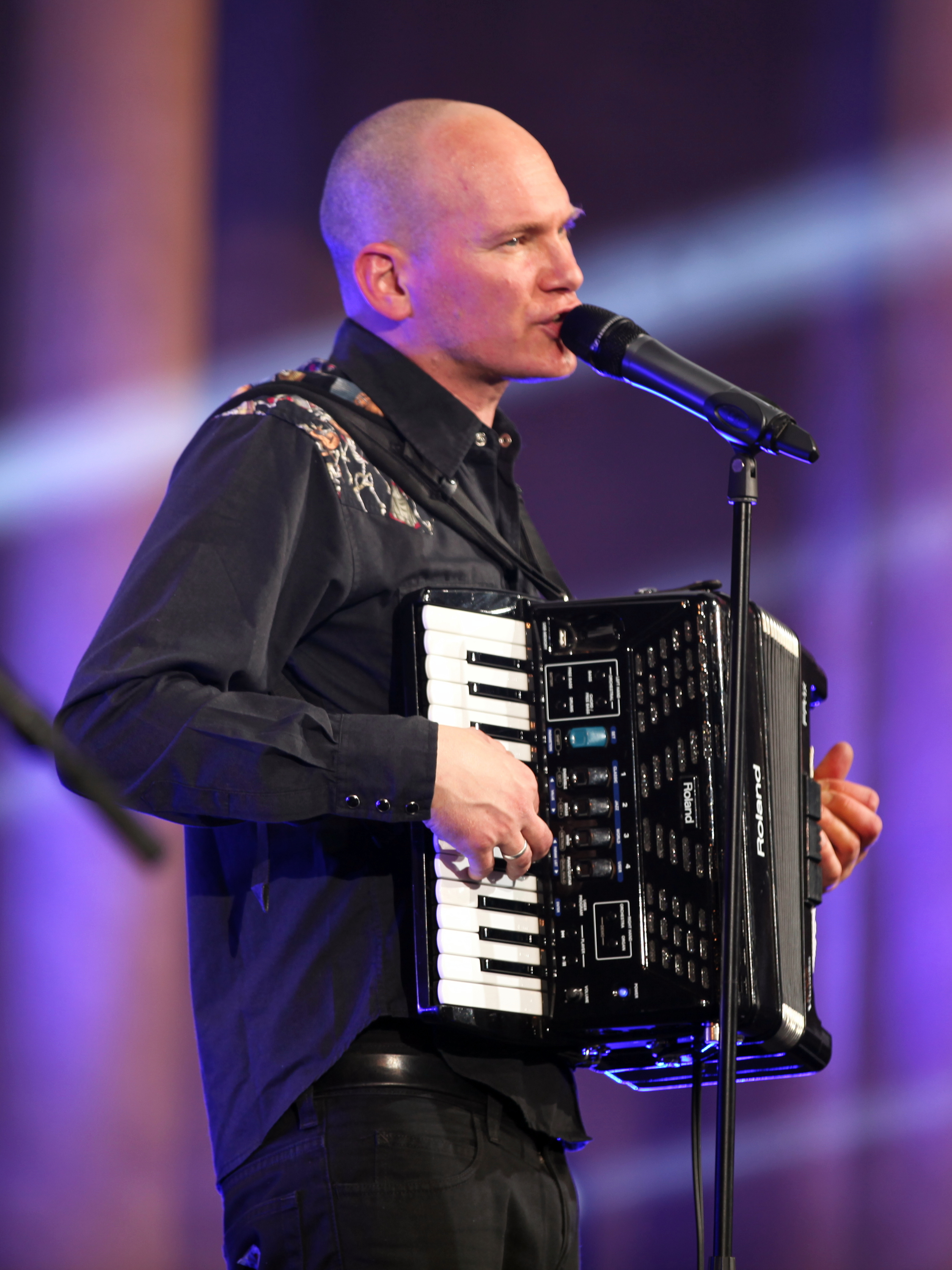 Rainer von Vielen mit Band auf dem Heimatsoundfestival 2015 in Oberammergau. Rainer Von Vielen mit Akkordeon Roland FR-X1 Gesang, Akkordeon, Gitarre: Rainer von Vielen (Rainer Hartmann) Gitarre: Mitsch Oki (Michael Schönmetzer) Bassgitarre: Dan Le Tard (Daniel Schubert) Schlagzeug: Sebastian Schwab